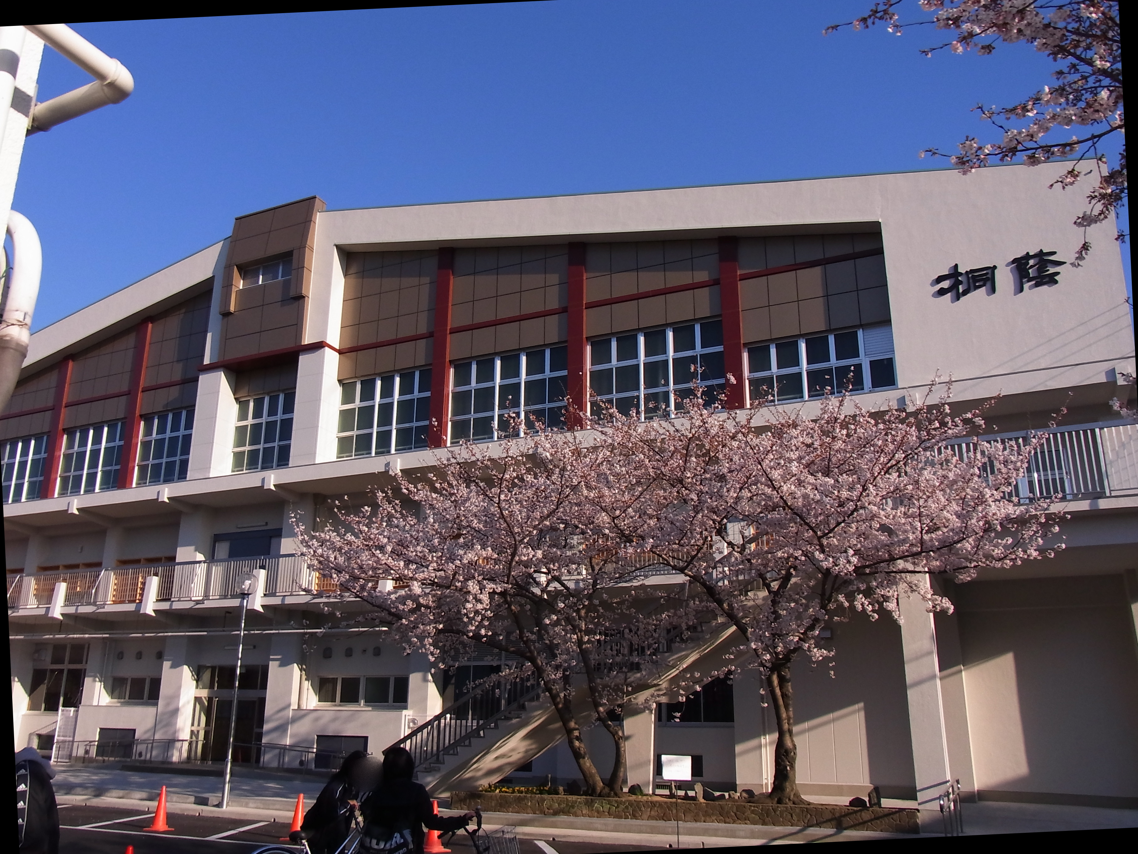 改修工事完了後の和歌山県立桐蔭中学校・高等学校の体育館。